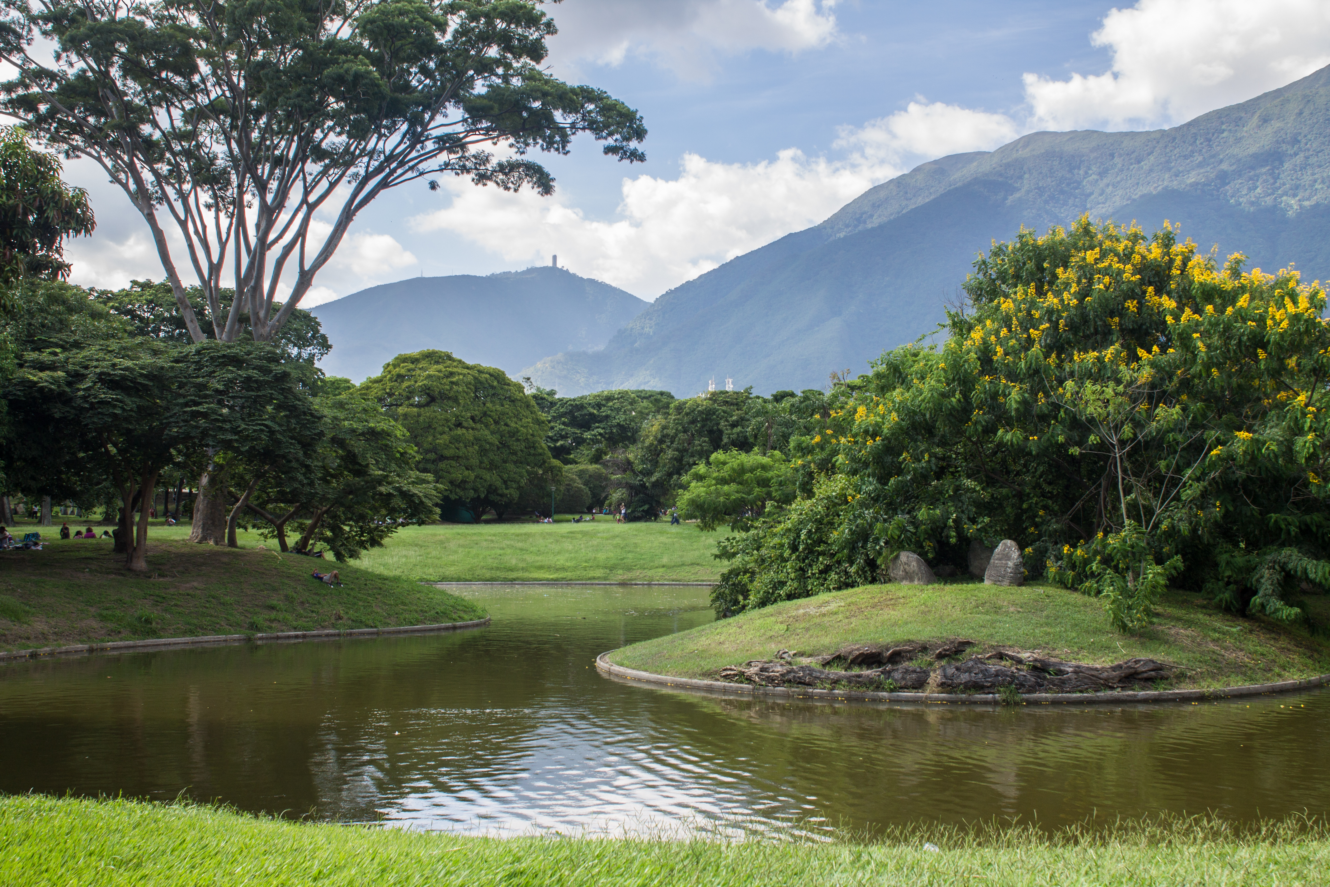 Miranda